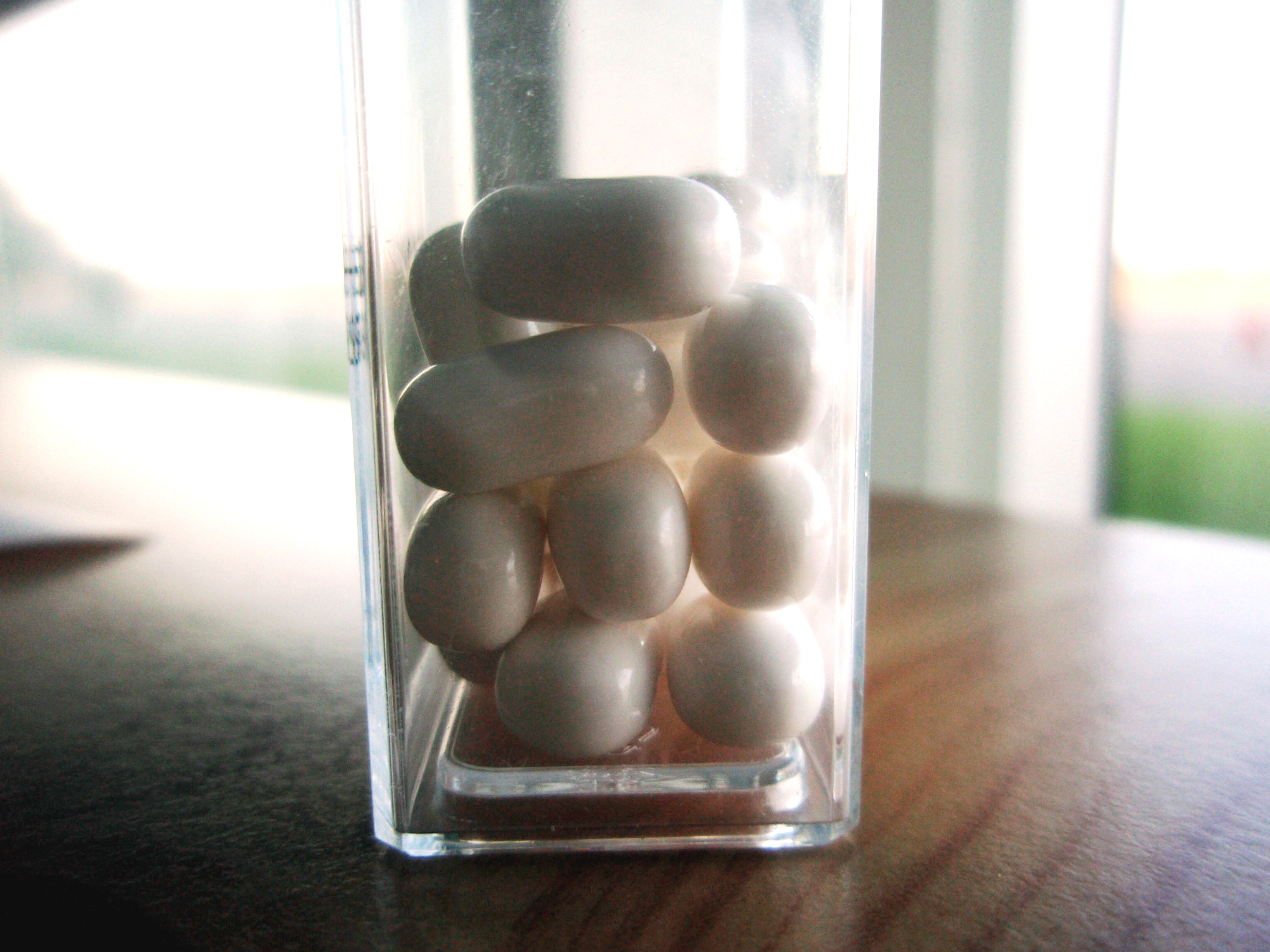 Tic Tac